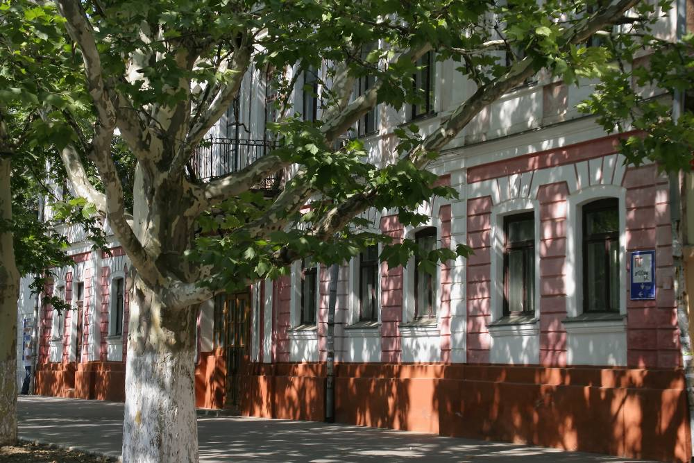 Schulgebäude in der Innenstadt Chersons, Ukraine.